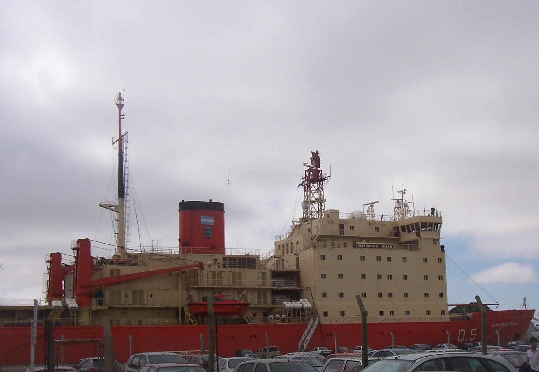 El ARA Almirante Irízar (Q-5), en el puerto de la ciudad de Buenos Aires, Argentina.